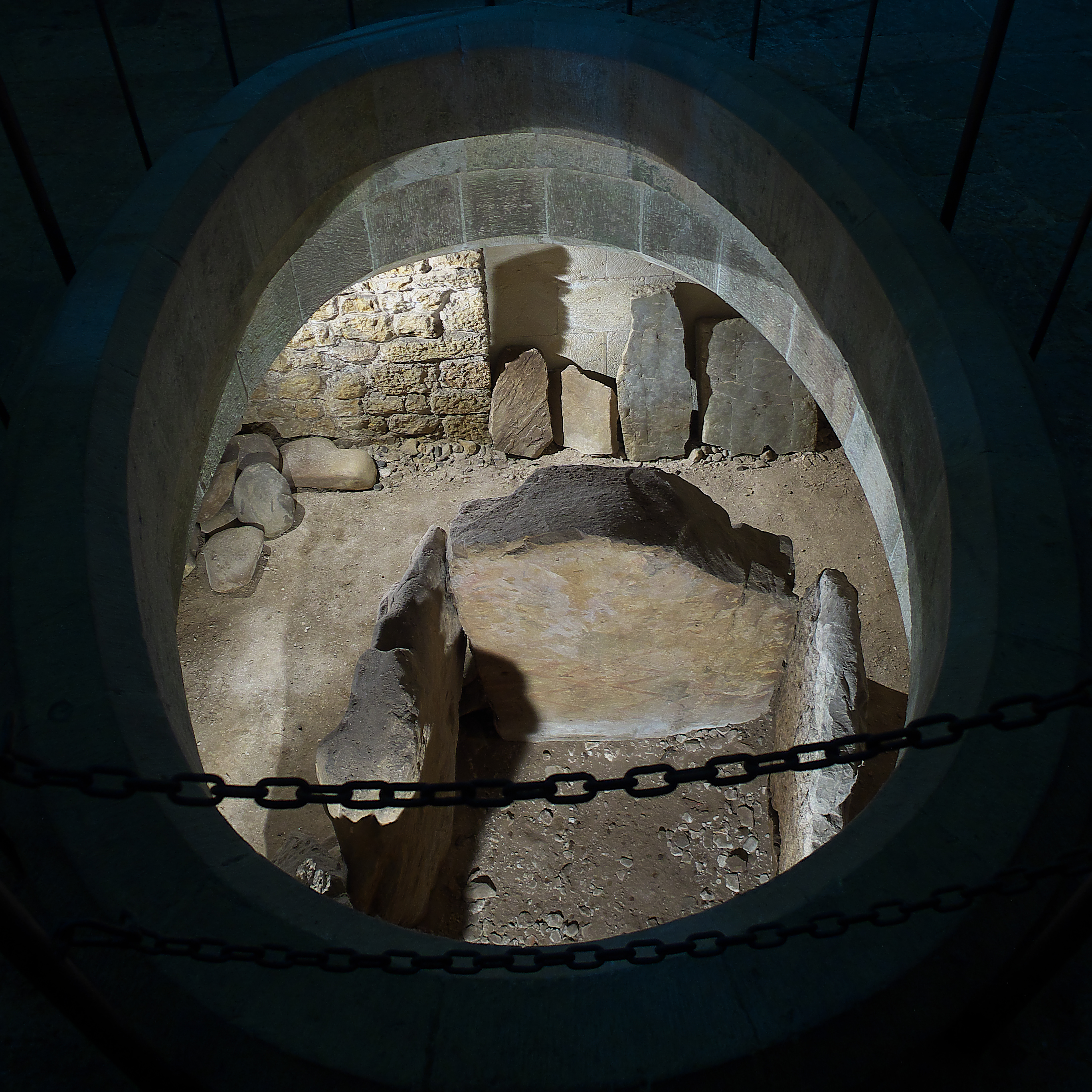 Dolmen de Santa Cruz, situado en Cangas de Onís (Asturias). Sobre este dolmen megalítico, el rey Favila edificó una iglesia-panteón real.